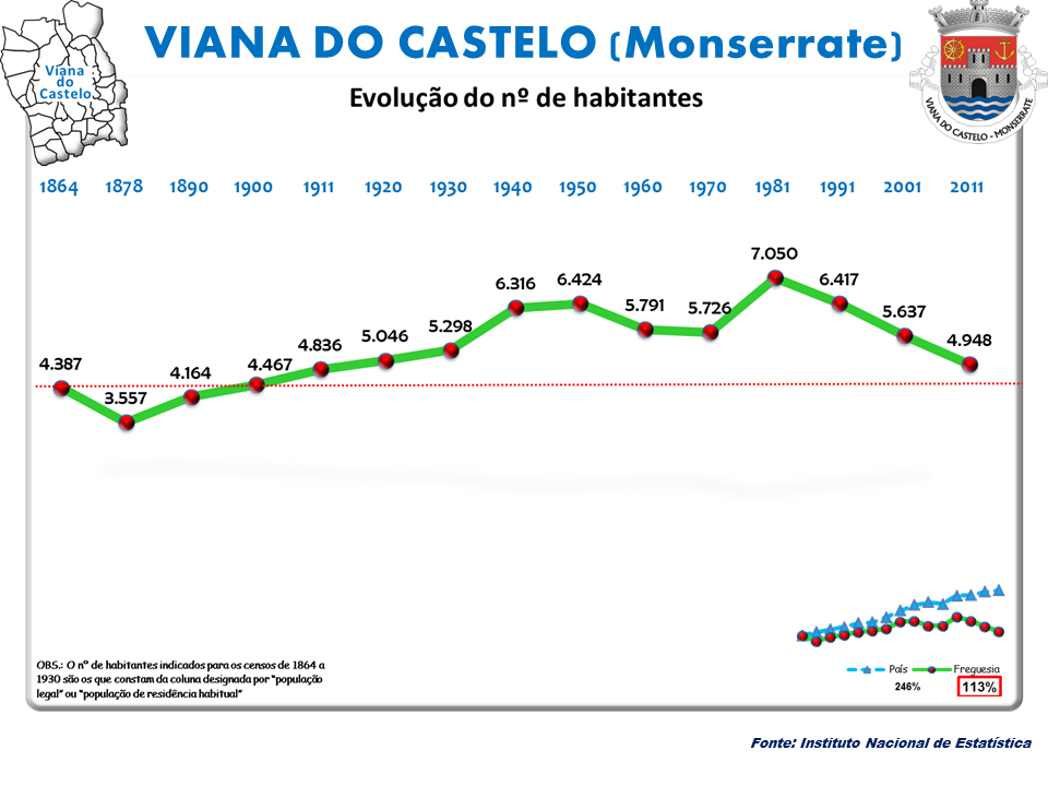 Censos 1864/2011